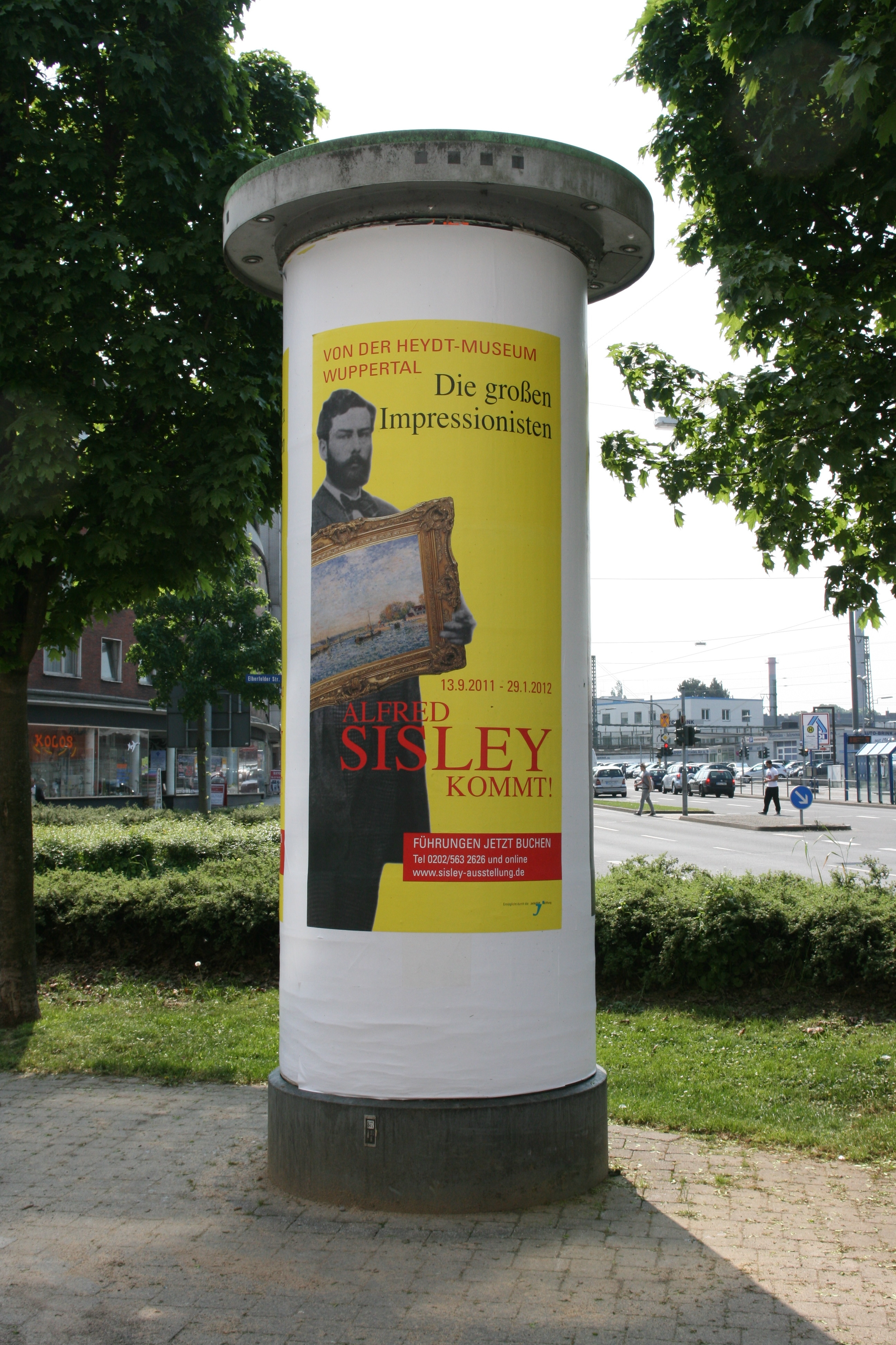 Graf-von-Galen-Ring in Hagen